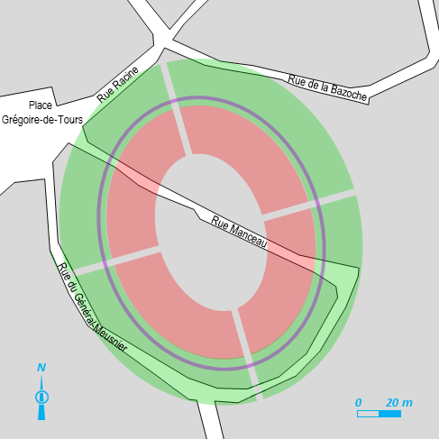 emprise des amphithéâtres successifs de Tours sur un plan moderne